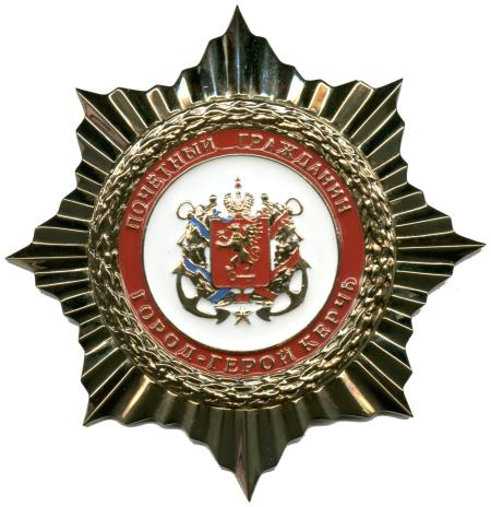 Знак Почётного гражданина Керчи